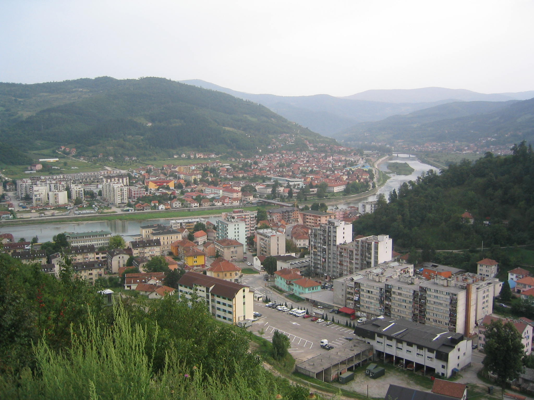 Panorama Goražda